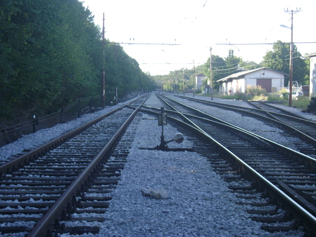 Kolodor Jurdani na Riječkoj pruzi